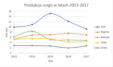 Najwięksi producenci sorgo na świecie.